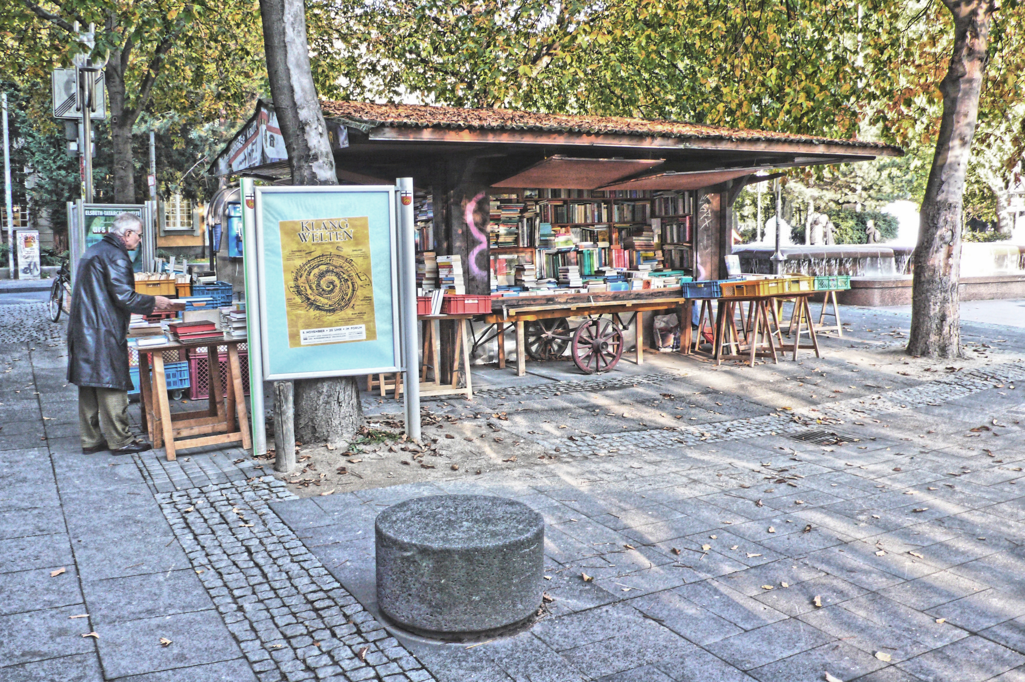 Bonn - Bücherstand - Antiquariat - Bouquinist - Karlsplatz Bonn